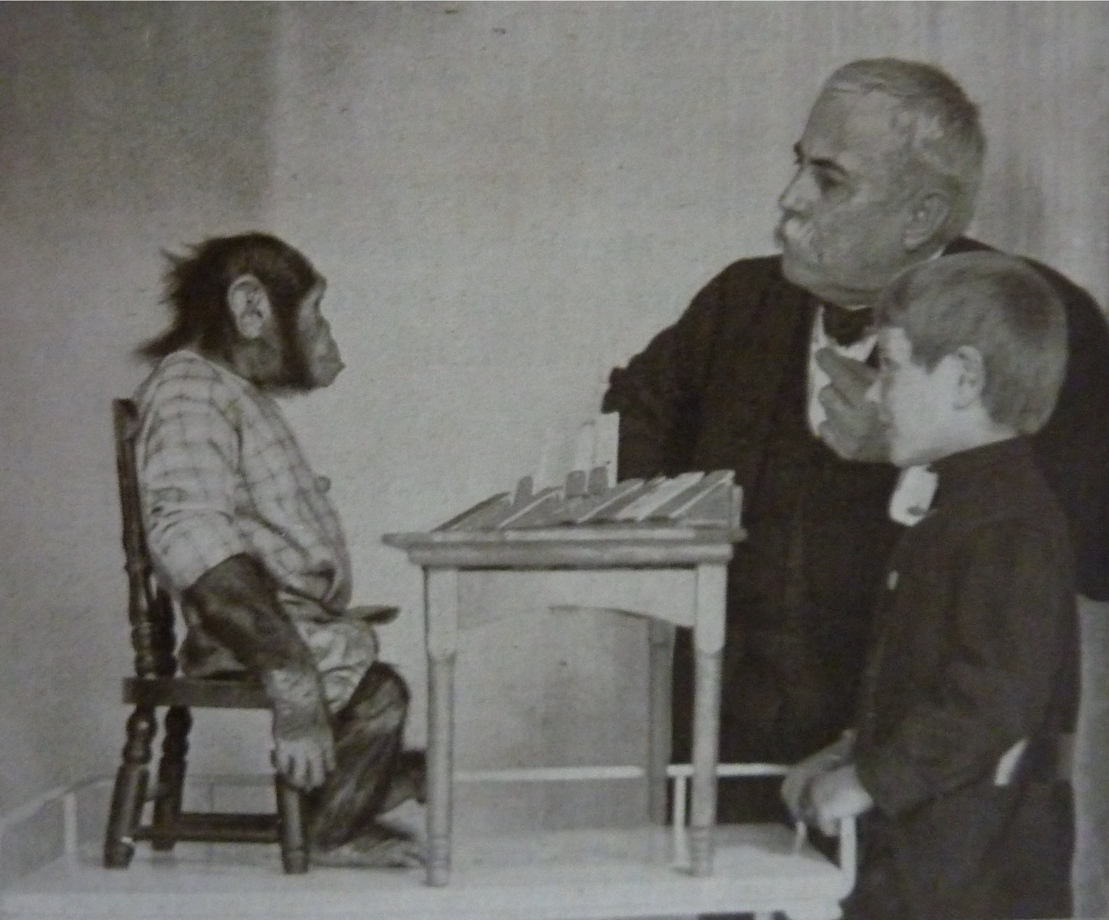 R. L. Garner beim Sprachunterricht mit einem Affen